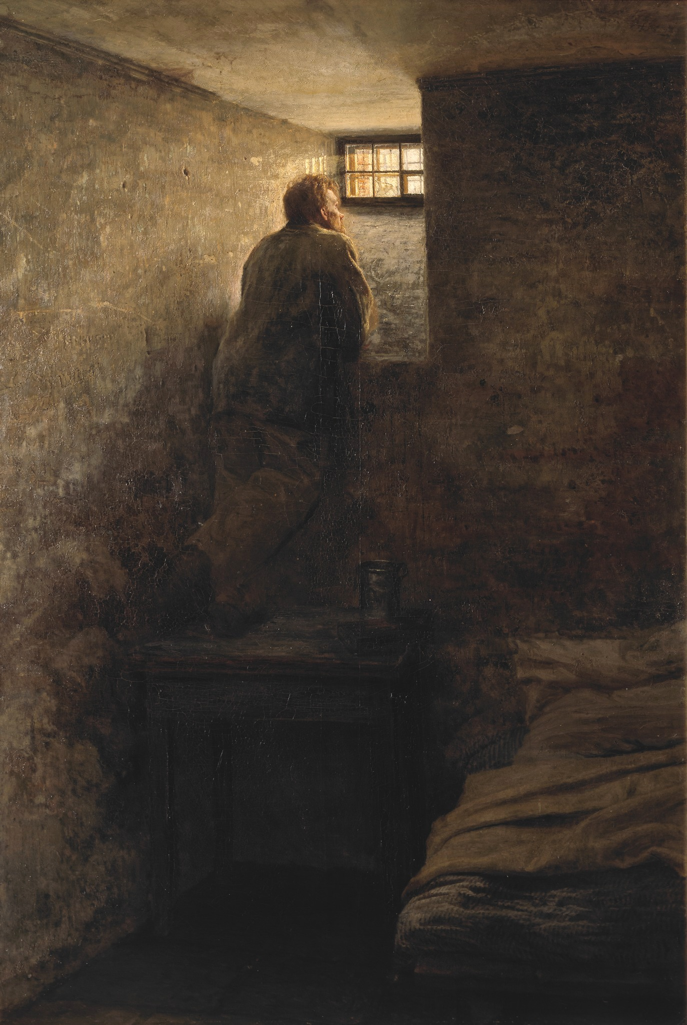 Il prigioniero